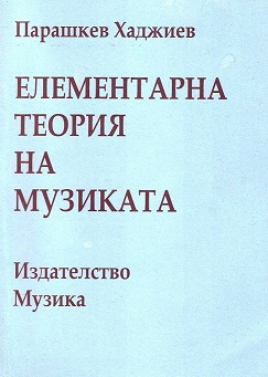 Елементарна теория на музиката